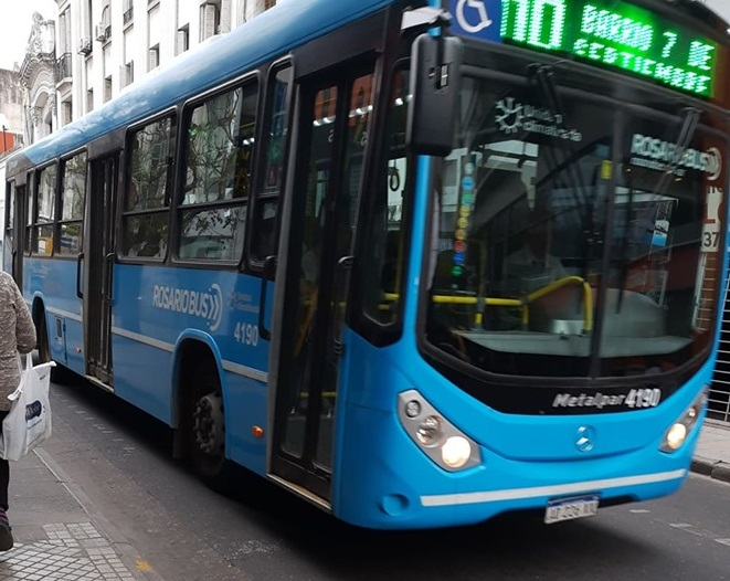 Mercedes-Benz O-500 de la empresa Rosario Bus, explotadora de la línea 110. El Barrio 7 de Septiembre es uno de los destinos de la línea.